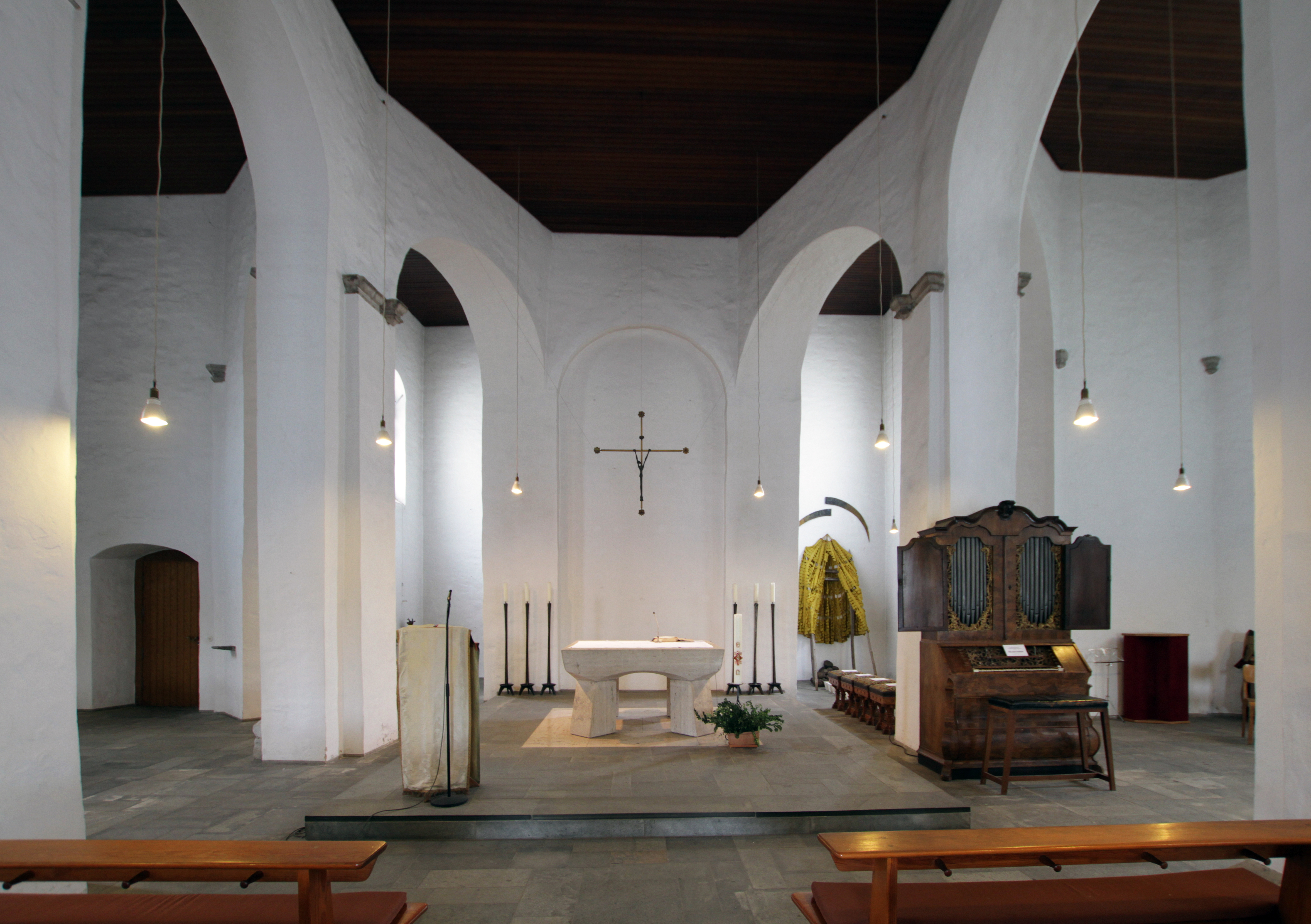 Köln-Mülheim, Innenausstattung der Clemenskirche